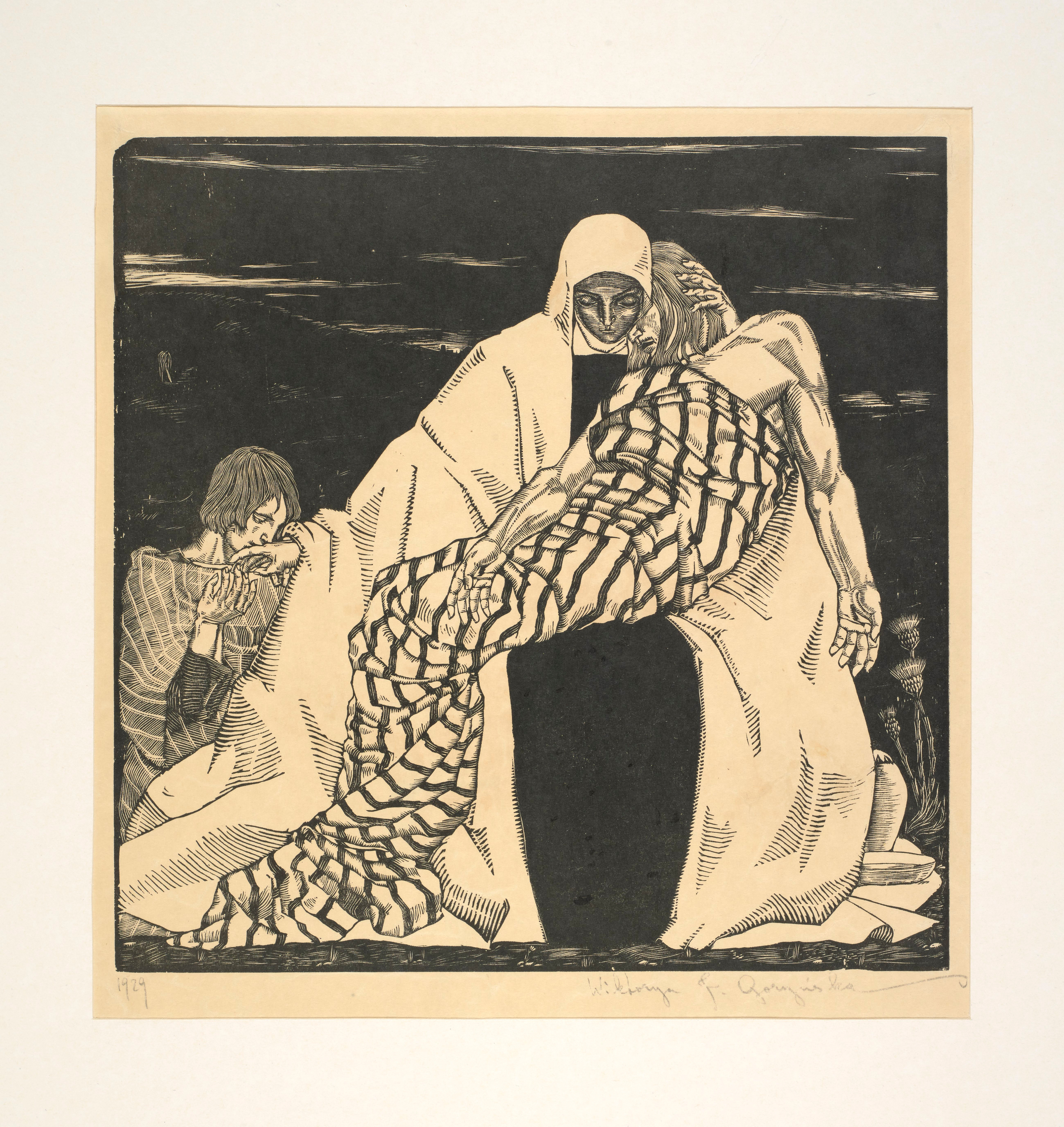 Pieta, Wiktoria Goryńska